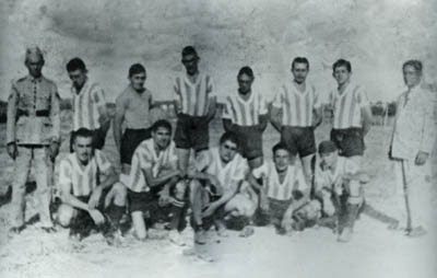 1939, um ano após a fundação do clube. No jogo, o Sport Club Tabira enfrentaria uma equipe de Sertânia. Em pé: Tenente Otávio Jurema (de farda), Isaac Mascena, Ismael Mascena, Júlio Cordeiro, Ramiro, Zé Pires e Ivo Mascena. Agachados: Severino Lolô, Nequinho, Esaú Mascena, Caneca e Valdemar Pereira. Legendas: Carlos Celso Cordeiro